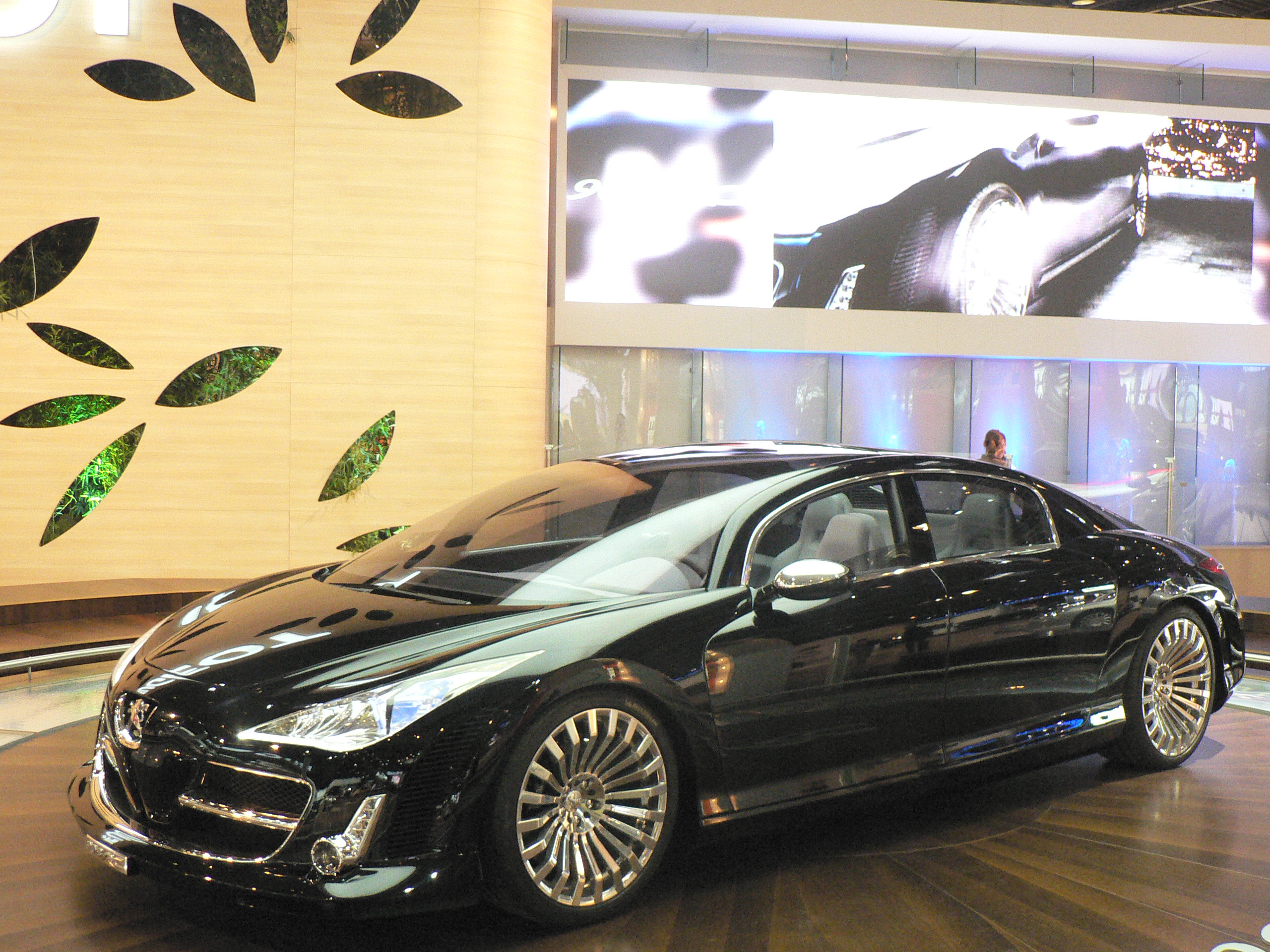 Mondial de l automobile de Paris (October 2006)